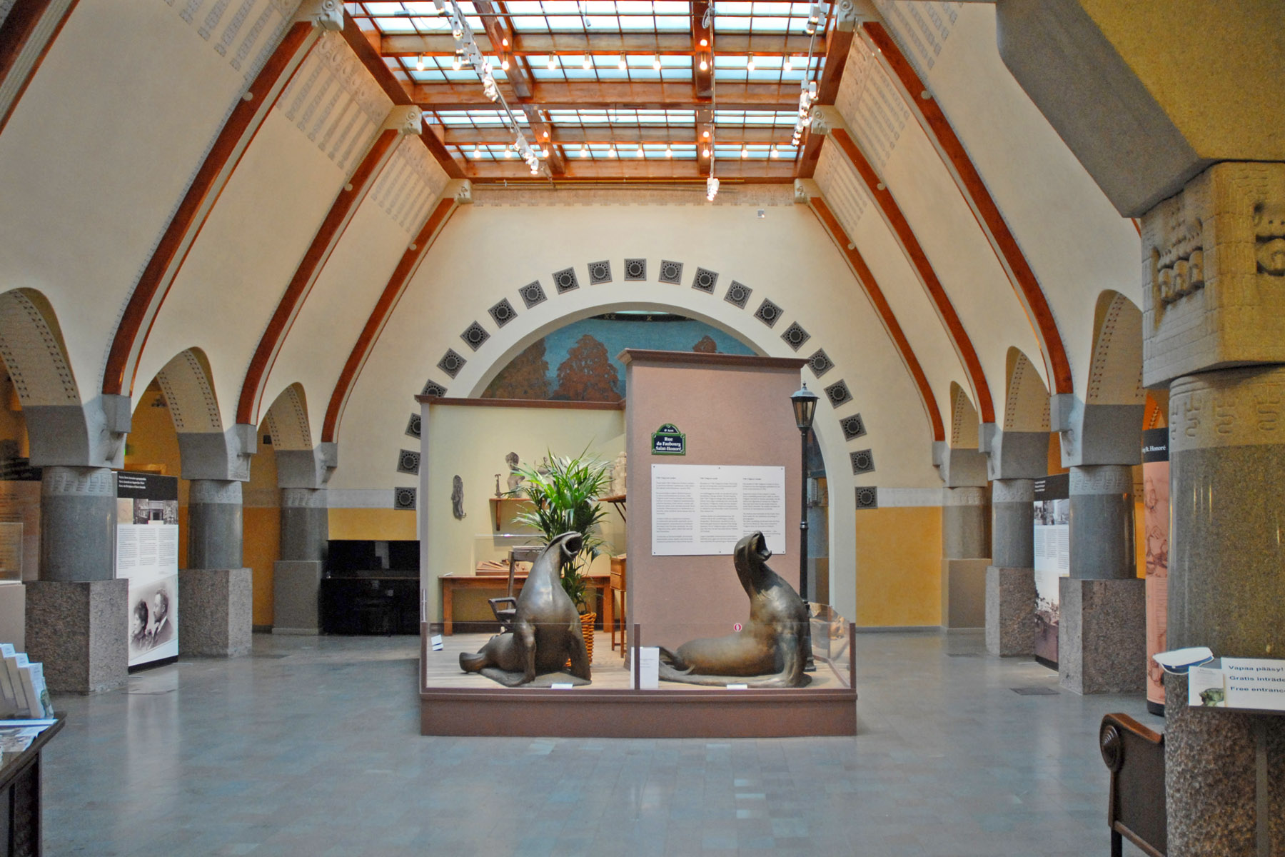 Exposition Havis Amanda, sculpture devenue le symbole d'Helsinki. Sculpteur: Ville Vallgren (1855-1940). Dans le hall jugenstil (art nouveau) de l'Uschakoff Building, conçu en 1903, par les architectes Lars Sonck et Valter Jung. La fresque a été peinte par Wilho Sjöström en 1916.